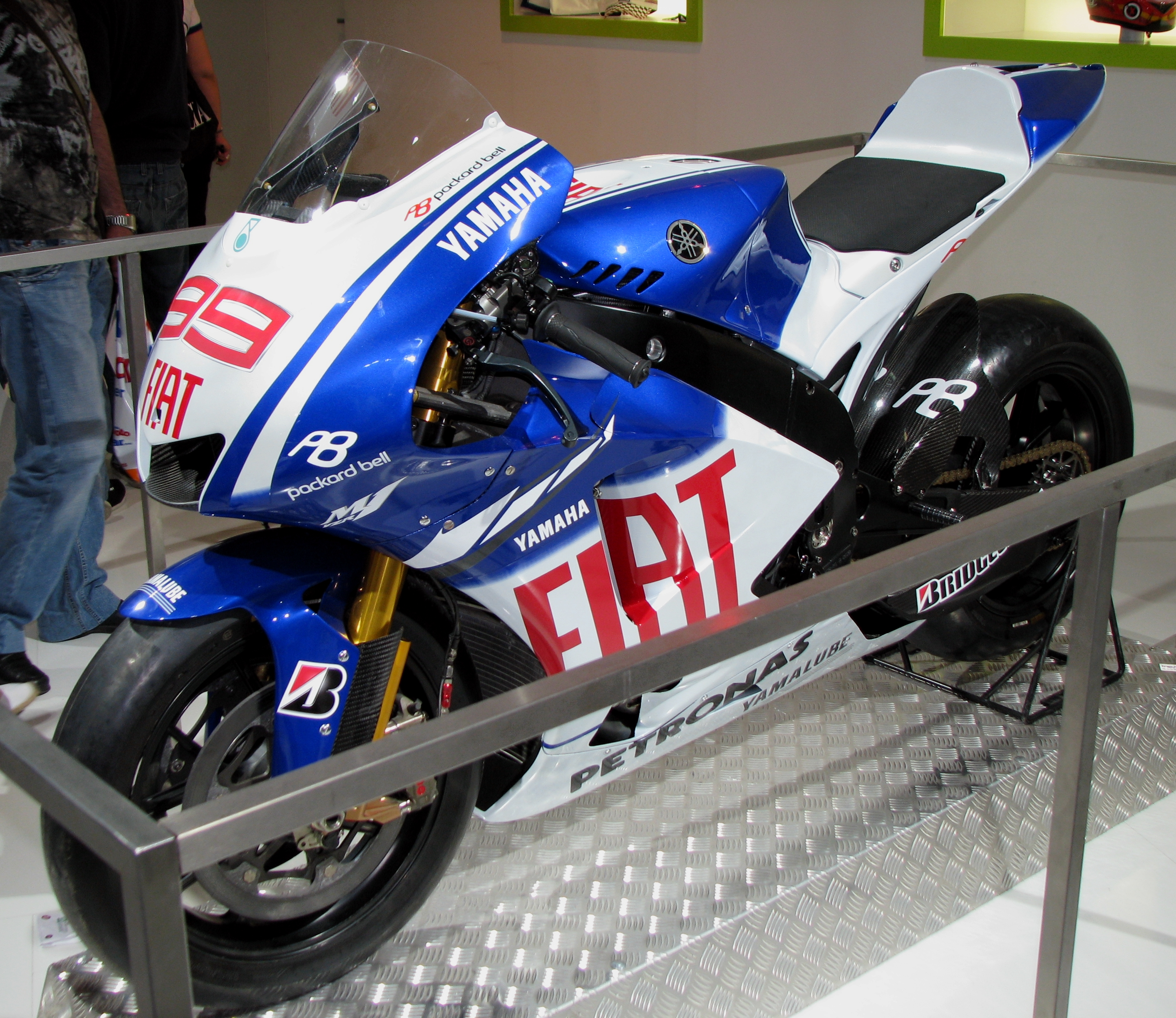 Yamaha YZR-M1 2009 de Jorge Lorenzo en el Salón Internacional del Automóvil de Barcelona de 2009.